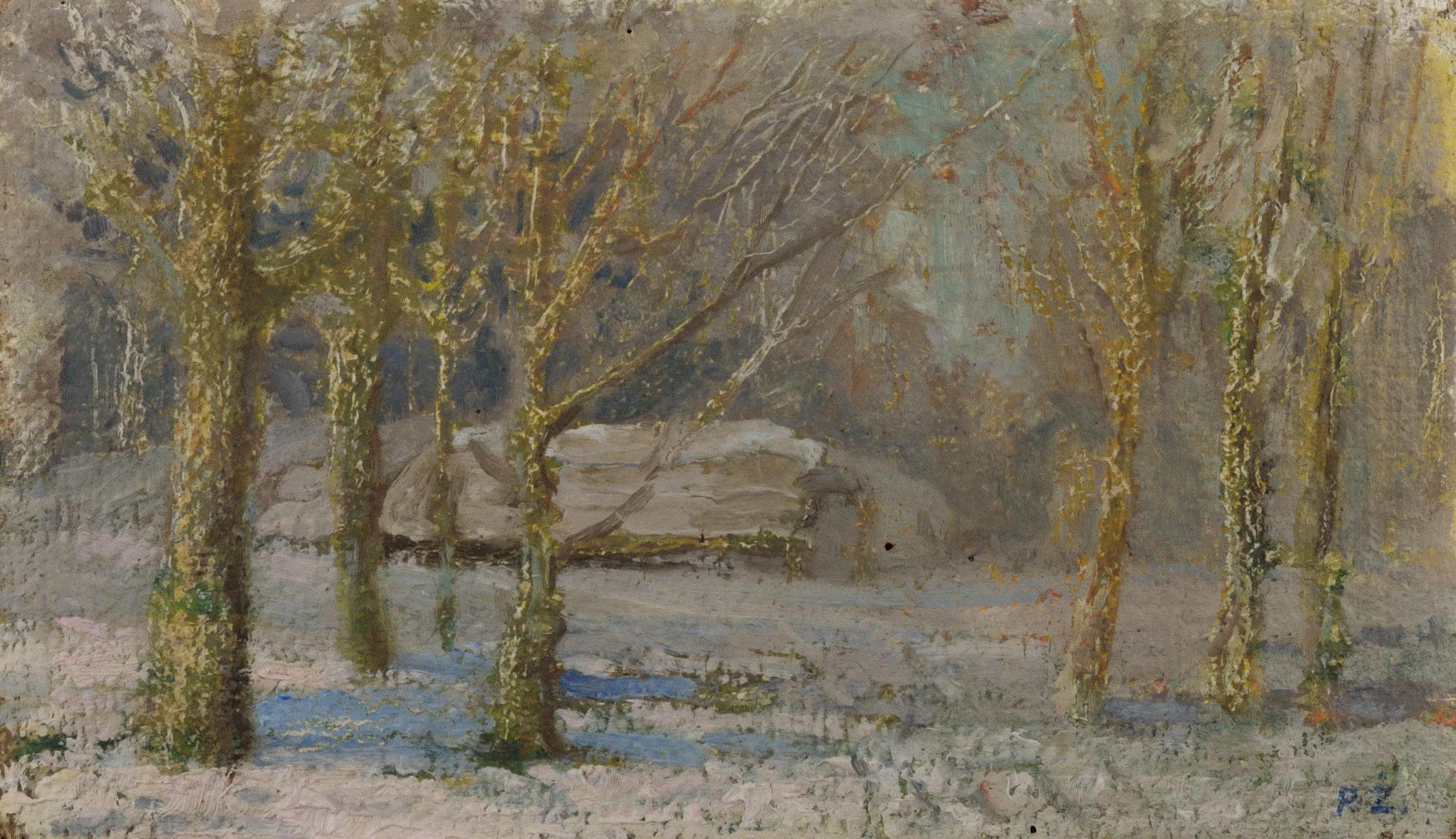 Zmimą 1930